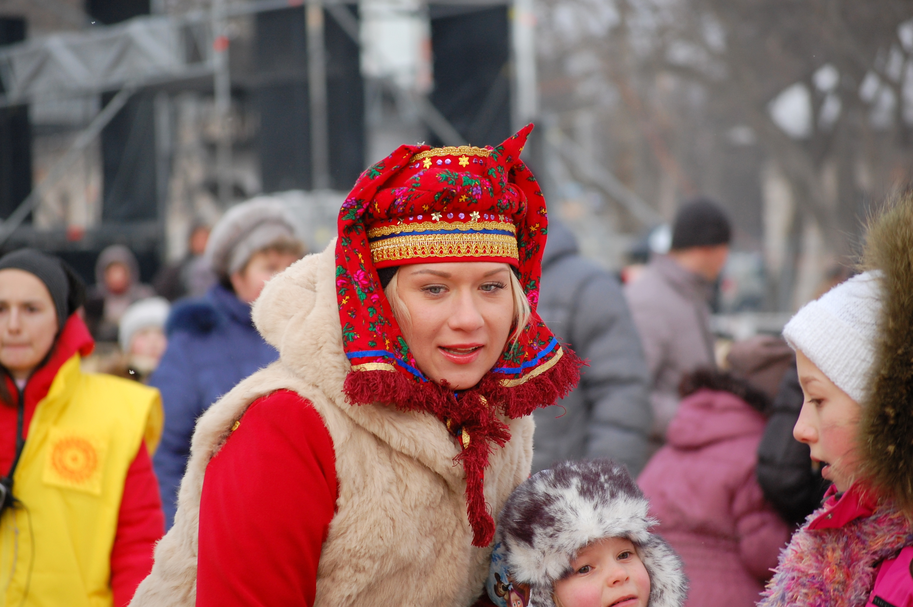 Maslenitsa